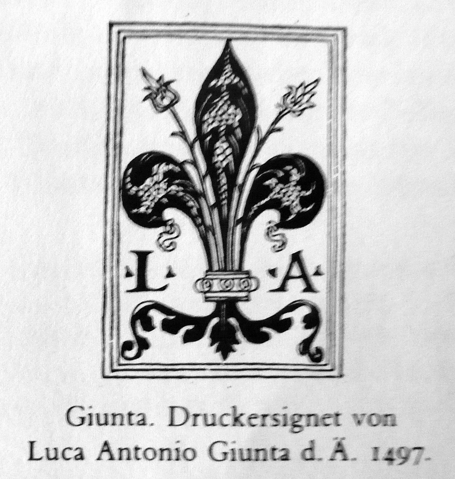 Giunta, Printer's mark